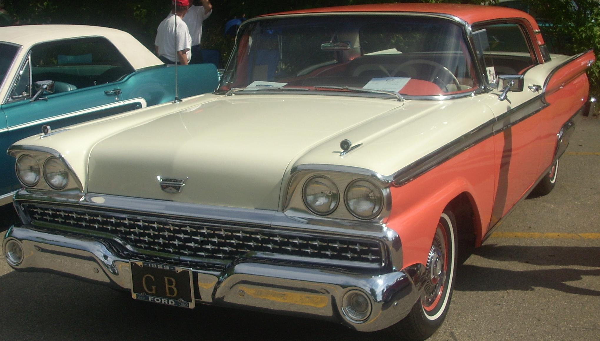 1959 Ford Galaxie photographed in Laval, Quebec, Canada at Auto classique Laval 2010.